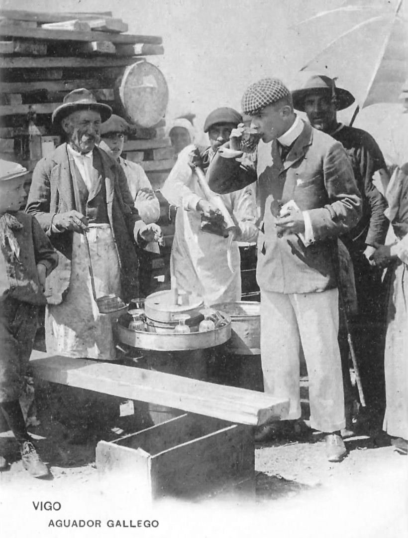 Chocolatero (izquierda), churrero (en el centro con el émbolo de la churrera al brazo) y paseante probando el chocolate. Vigo hacia 1900. Foto de Eugenio Krapf.